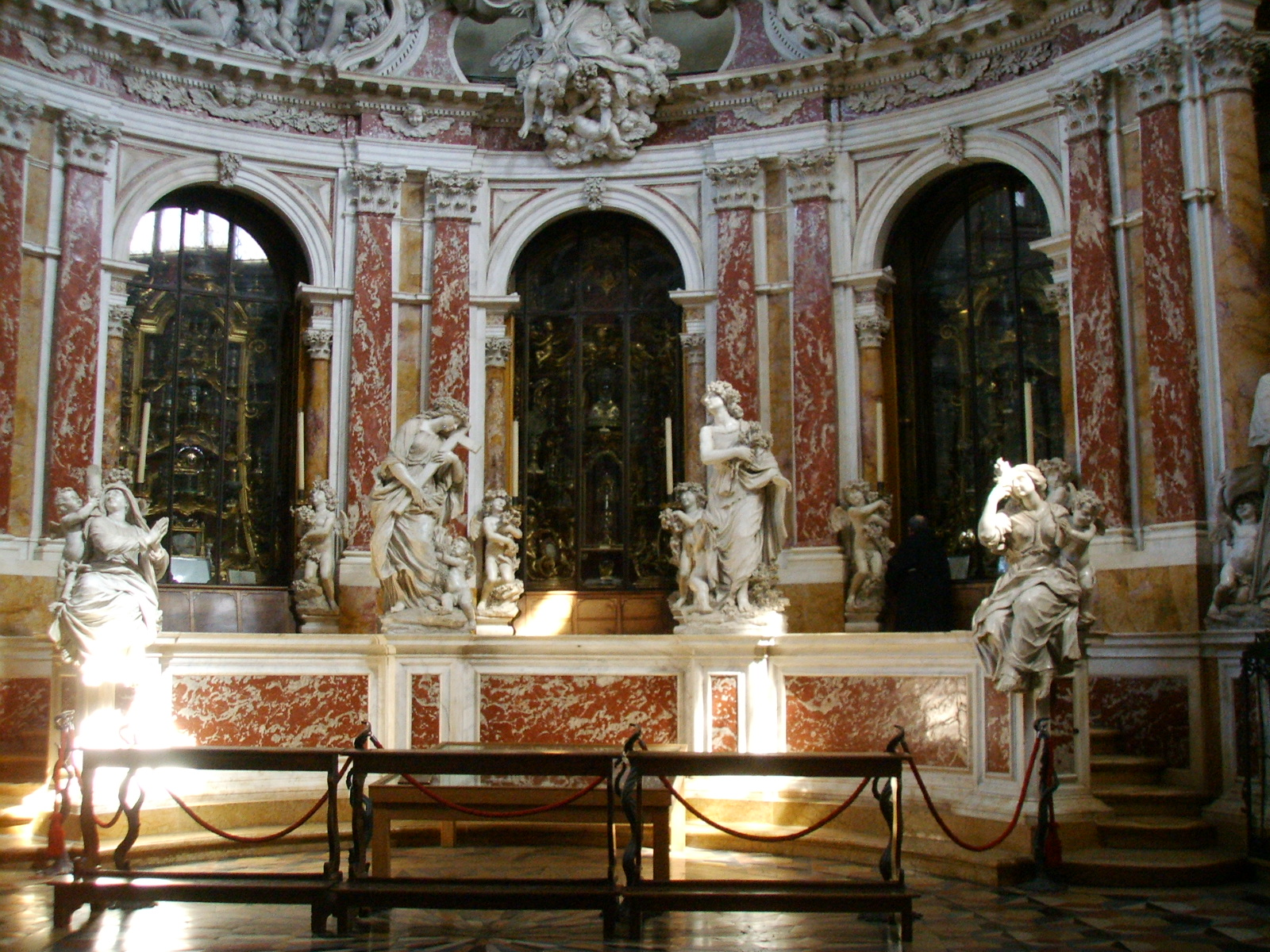 Padova, basilica del santo, cappella delle reliquie